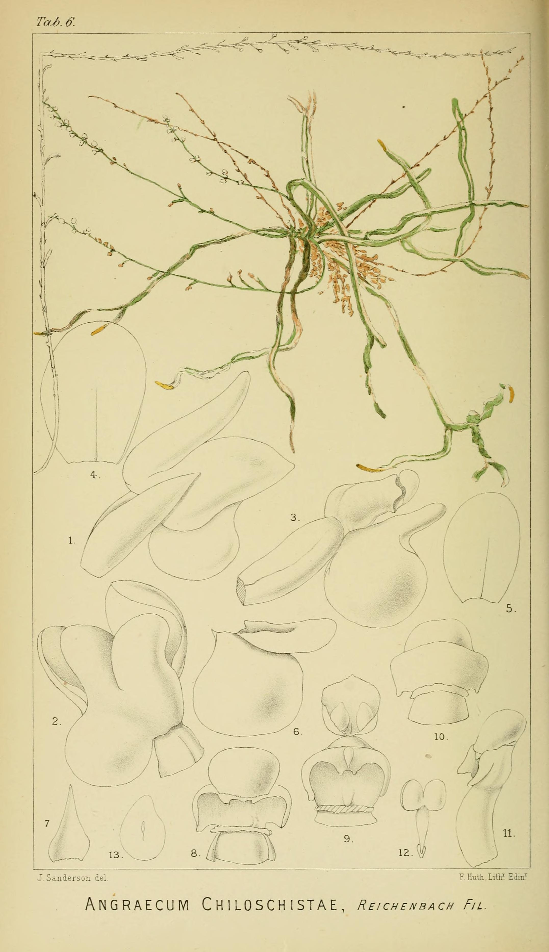 Microcoelia exilis Lindl., 1830 (syn. Angraecum chiloschistae)